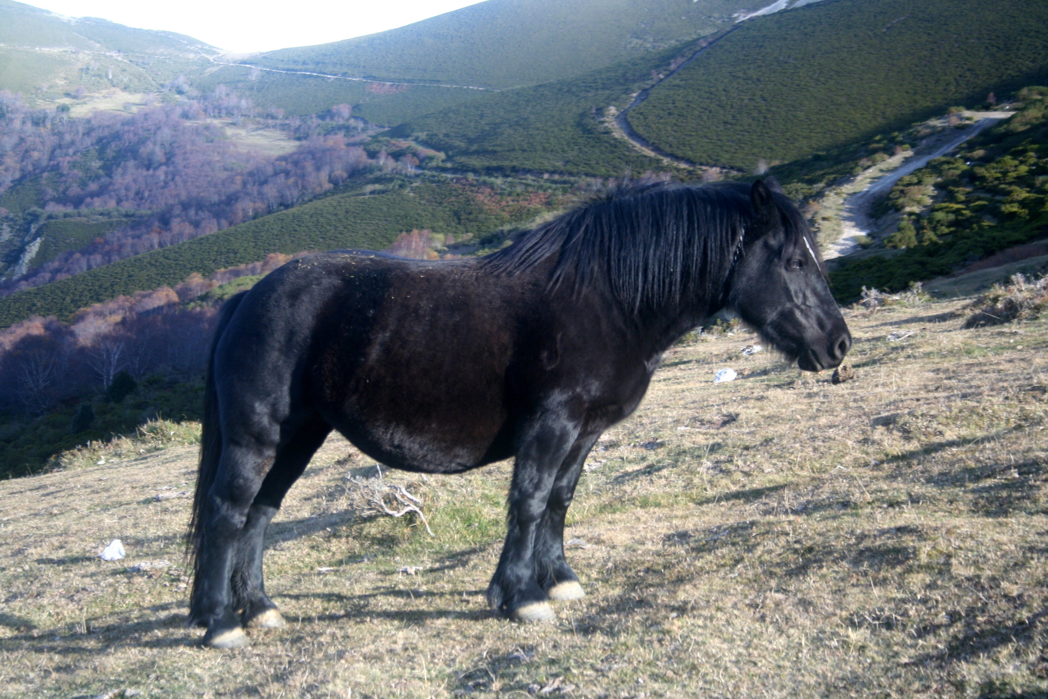 Asturcón o poni asturiano.